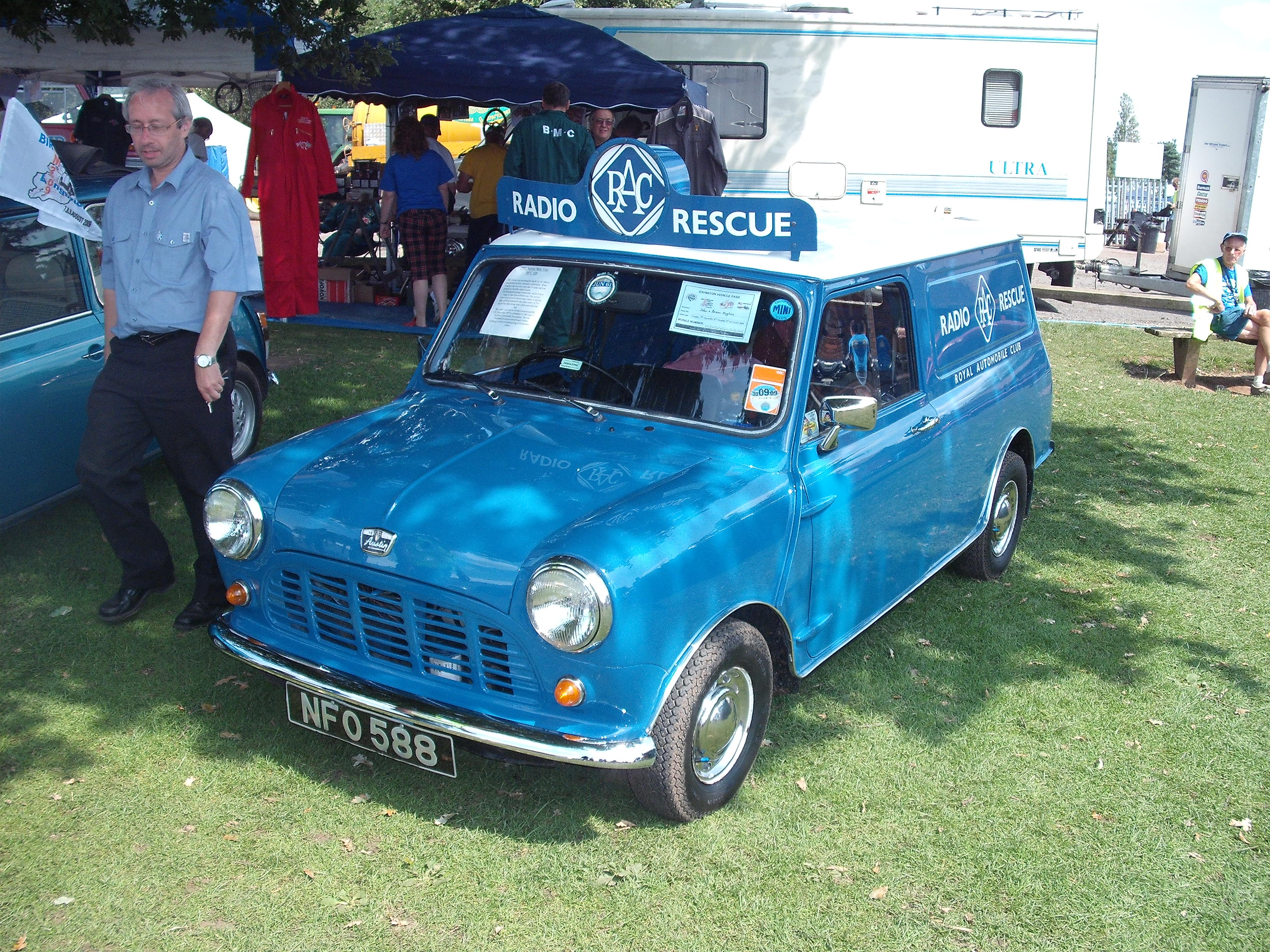 1961 RAC Radio Rescue, Austin Mini van.